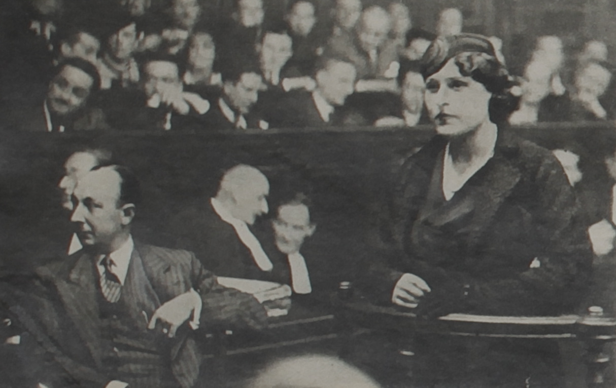 Andrée Cotillon est le témoin surprise du procès intenté par l'inspecteur Pierre Bonny au magazine Gringoire en février 1935 pour diffamation. Ses déclarations accusant Bonny de tentative de chantage à son endroit font sensation. Photographie illustrant l'article "Bonny arrêté" dans Police magazine, 9 décembre 1934.